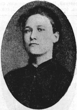 Ивановская Евдокия Семёновна - русская революционерка, народница, жена русского писателя Короленко В. Г.